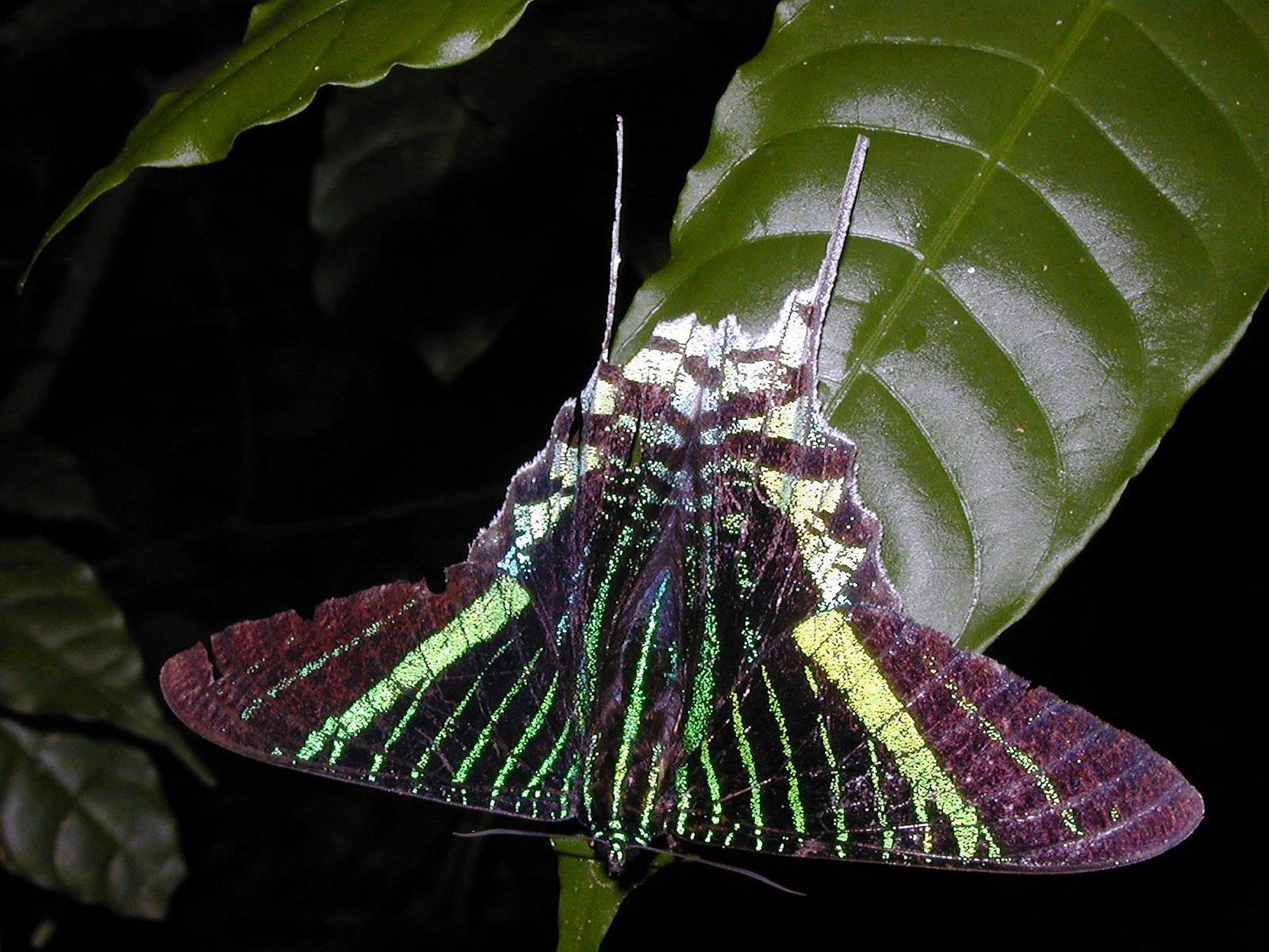 Urania sur une feuille. Détail